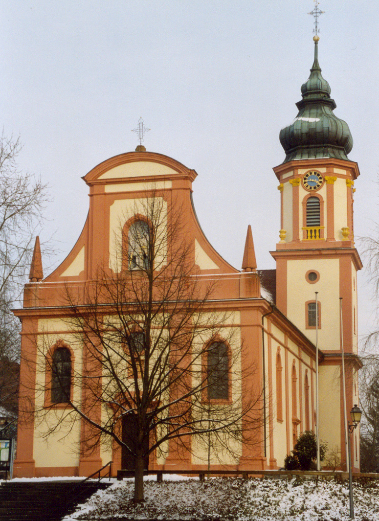 Die katholische Pfarrkirche St. Michael in Appenweier (Landkreis Ortenau, Baden-Württemberg). Die Kirche wurde 1748-1750 nach Entwurf von Ignaz Krohmer, Hofbaumeister der Markgrafschaft Baden-Baden, errichtet. Die Barockkirche wurde für dörfliche Verhältnisse reich ausgeziert.